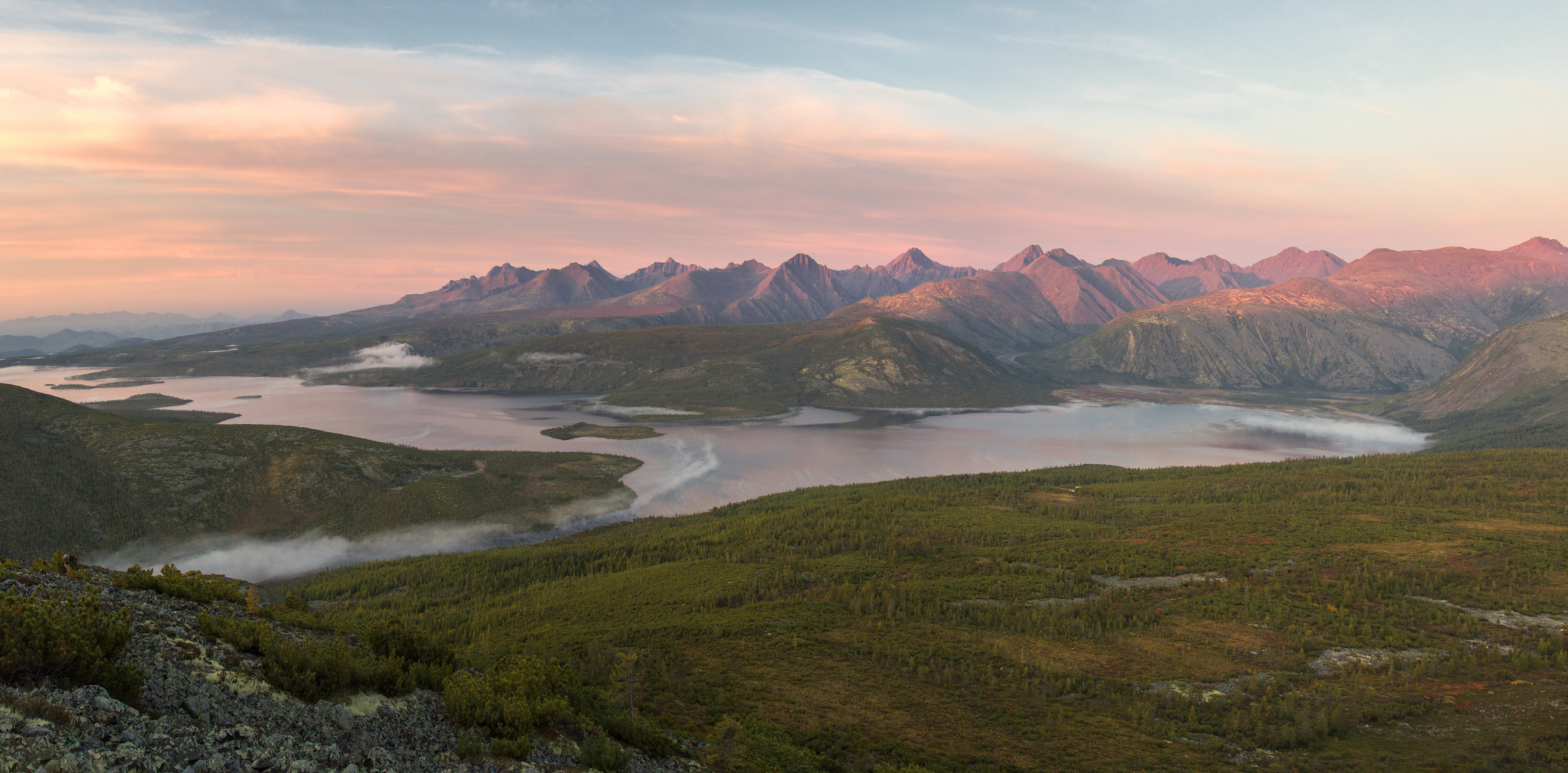 Хребент Ангачак возвышается над озером Джека Лондона. Ягоднинский район Магаданской области This image is related to the protected area of Russia number 4910060